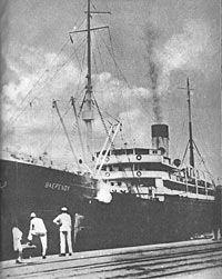 Foto do navio mercante brasileiro Baependy, torpedeado em agosto de 1942 pelo submarino alemão U-507, no litoral do estado de Sergipe.